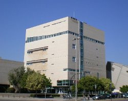 Centro Asociado de la UNED en Cartagena